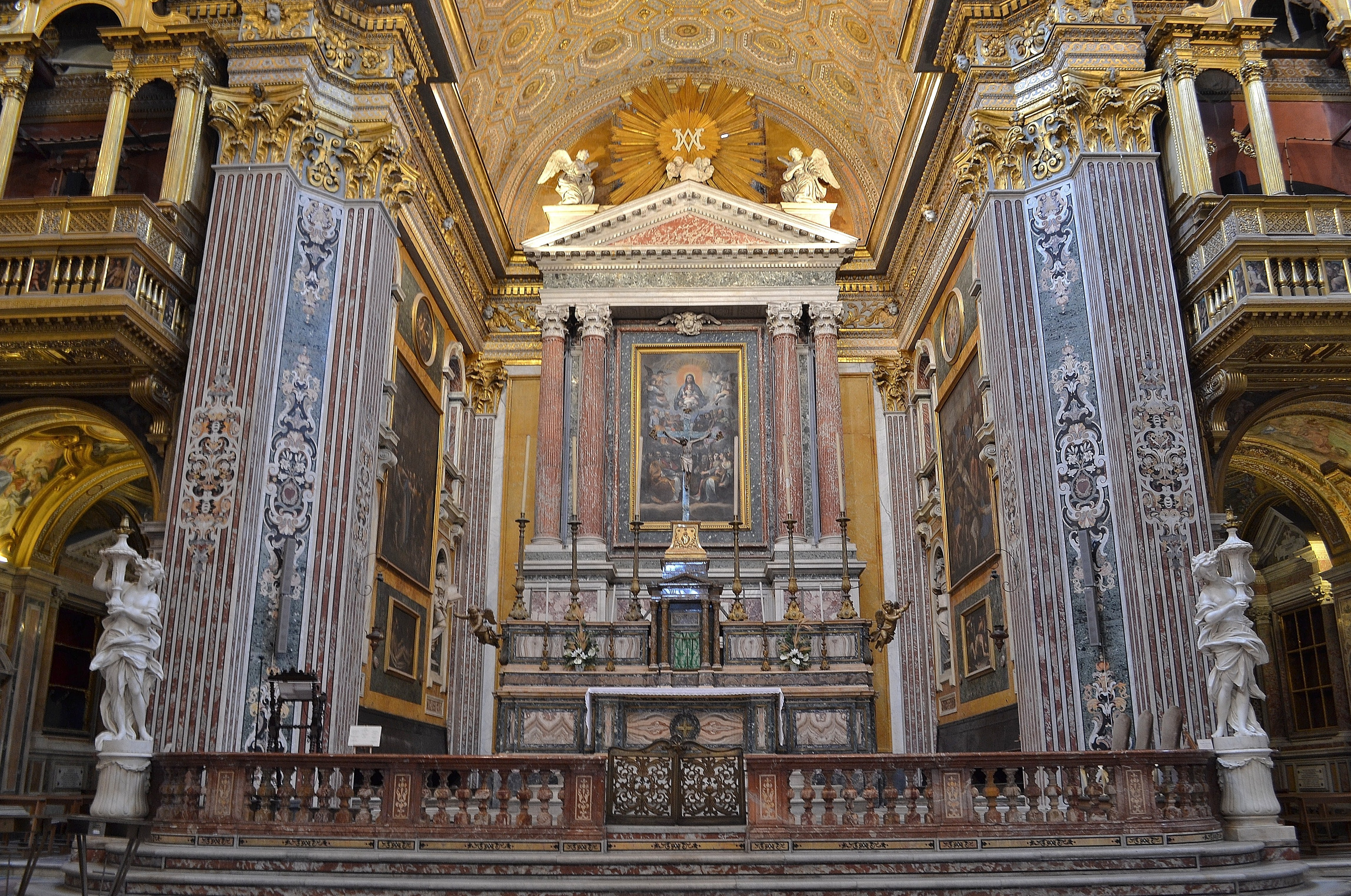 Zona absidale della Chiesa dei Girolamini di Napoli